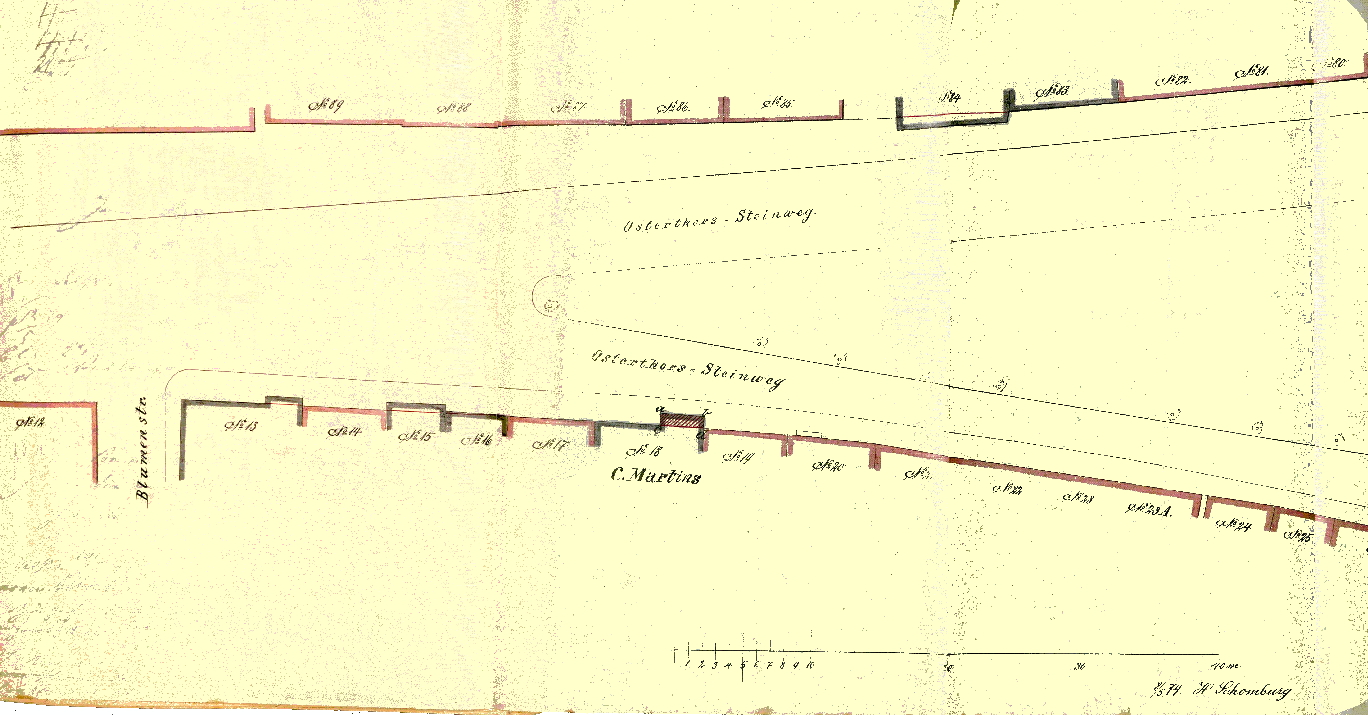 Ostertorsteinweg in Bremen, Baulinienplan von 1879